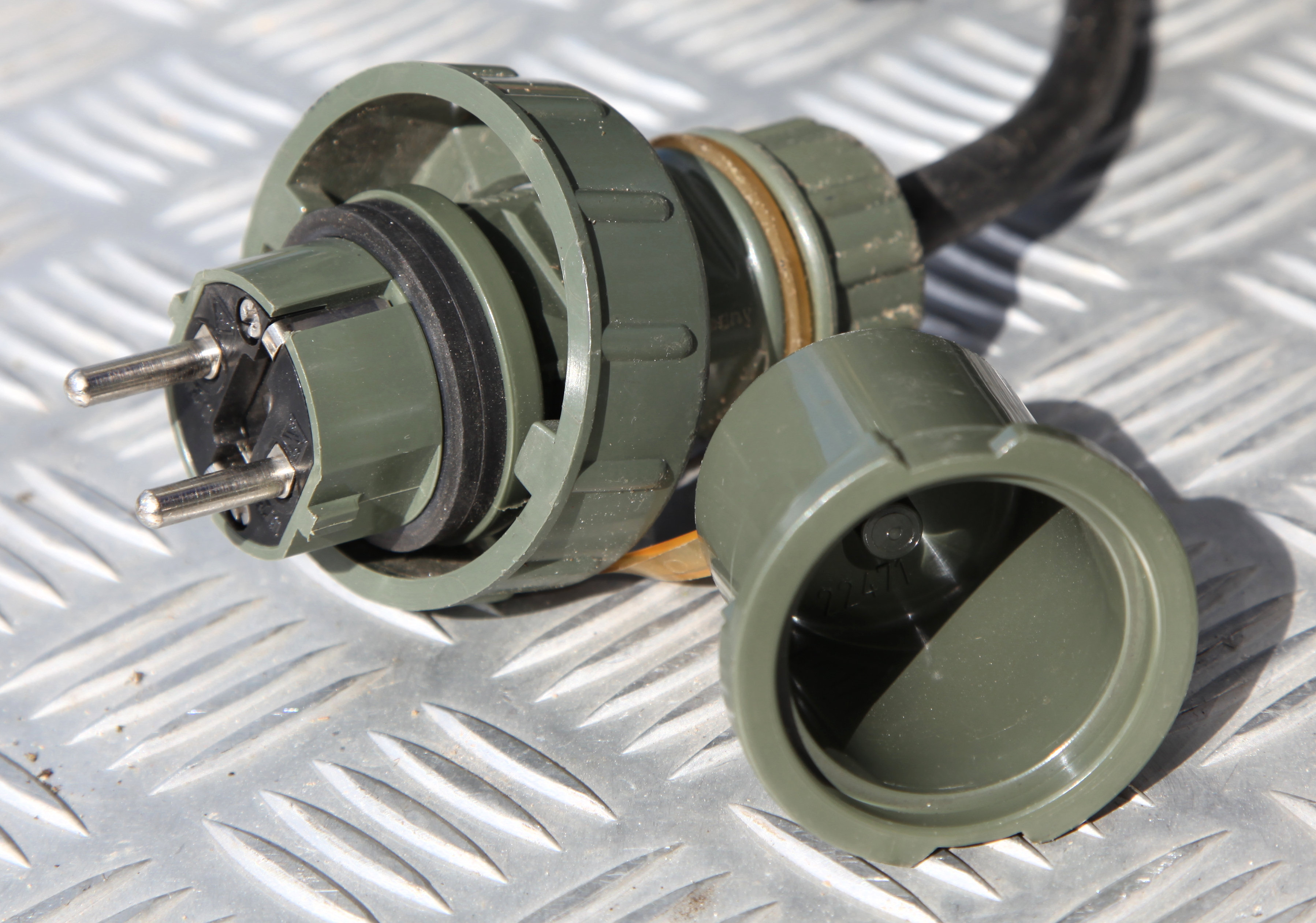 IP67 Schuko, THW OV Neuruppin